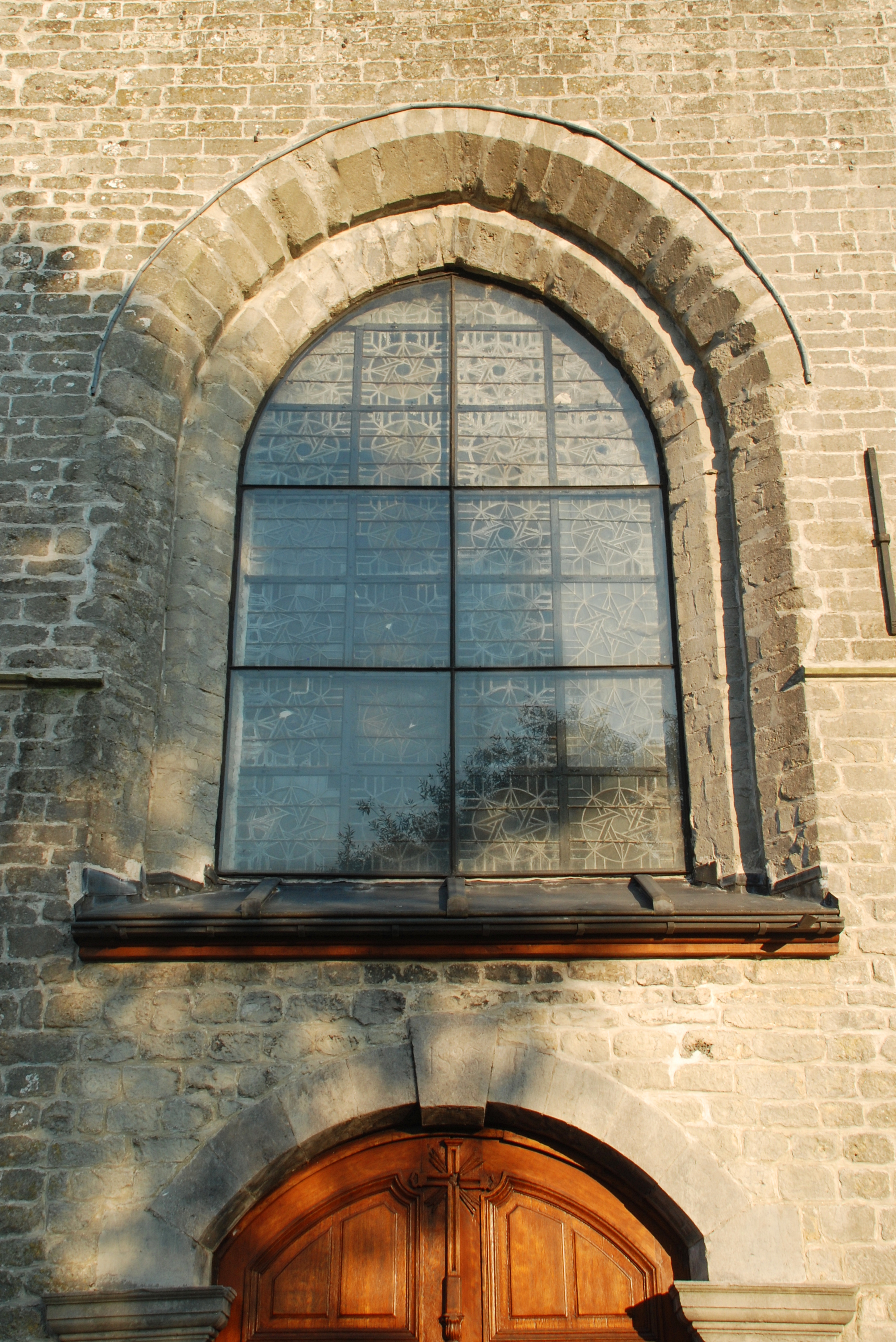 Belgique - Brabant Wallon - Lasne - Église Saint-Étienne d'Ohain